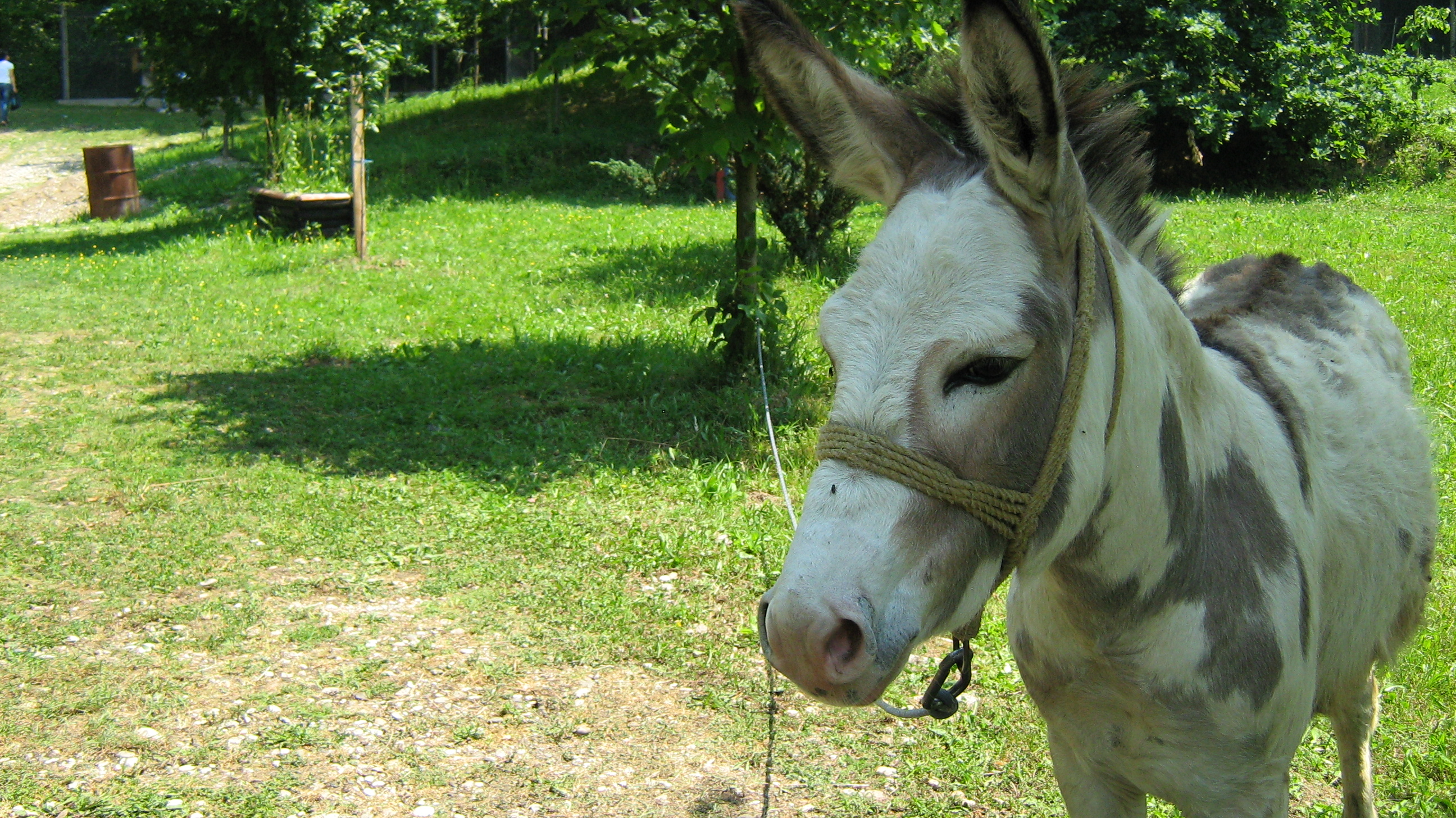 Бањалучки зоолошки врт